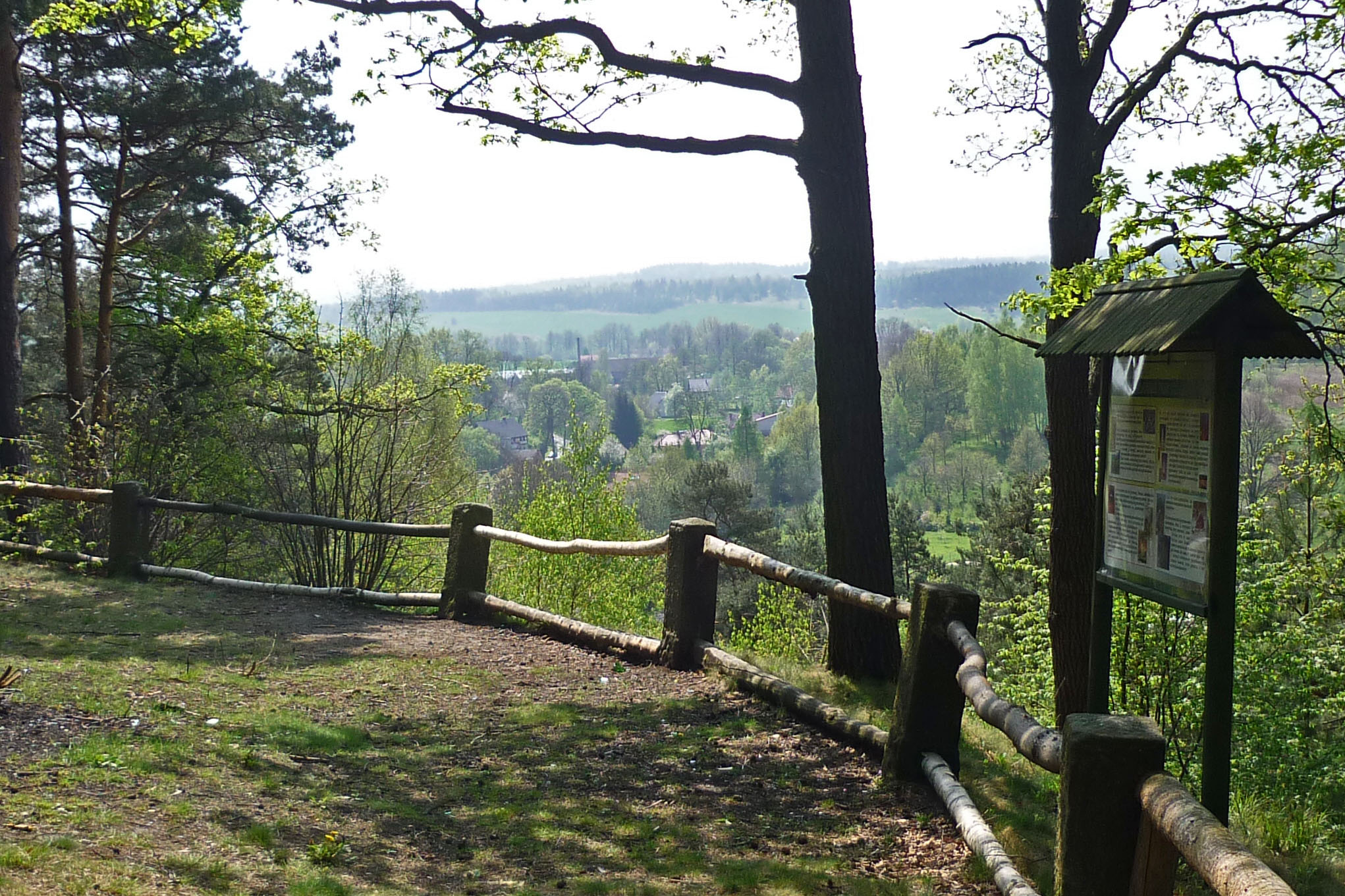 In der Löwenberger Schweiz bei Löwenberg (Lwówek Śląski) in Niederschlesien - Blick ins obere Bobertal